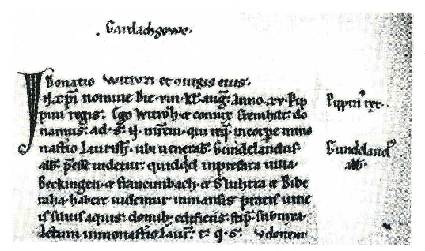 Lorscher Kodex Böckingen 767